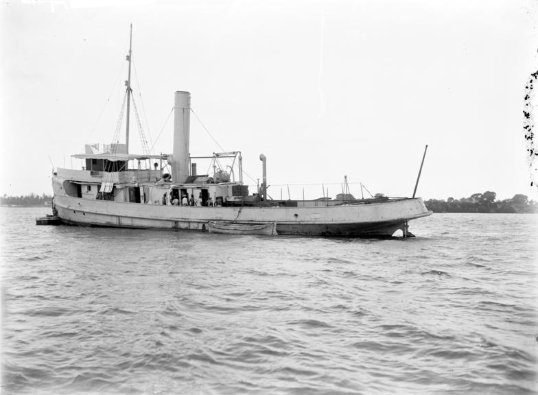 Deutschen Rubens bringt Febr. 1915 Waffen und Munition Information added by Wikimedia users.Es handelt sich nicht um den Dampfer "Rubens", siehe File talk:Bundesarchiv Bild 105-DOA3040, Deutsch-Ost-Afrika, Dampfer "Rubens".jpg